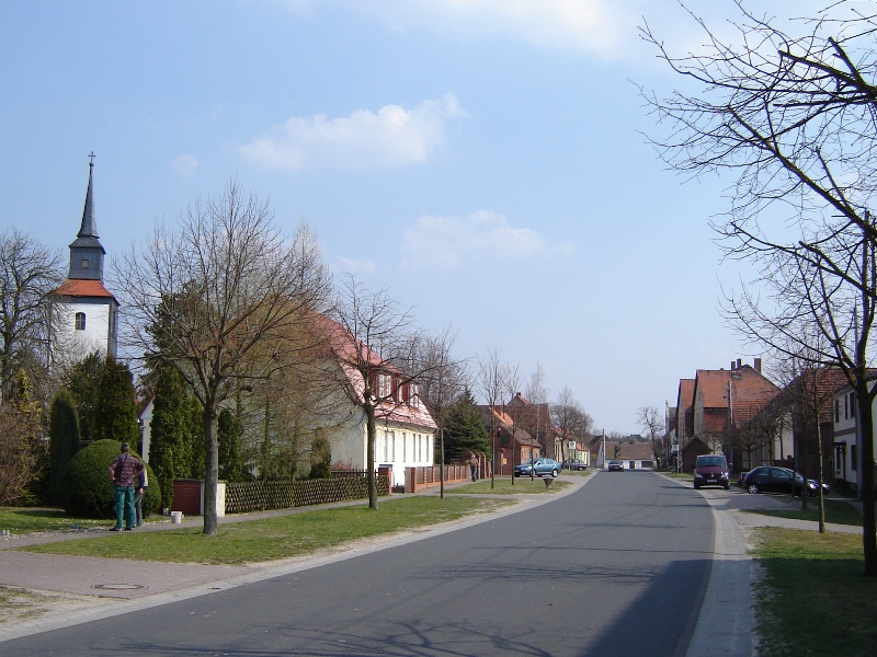 Niebelock, Sachsen-Anhalt, Lindenstraße